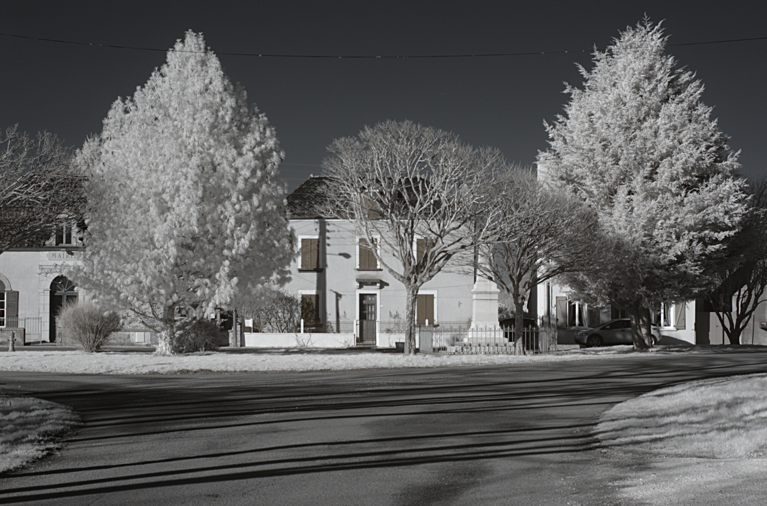 Place de l'Église, Franxault (Côte d'Or, Bourgogne, France) photographié avec un filtre infrarouge 760 nm.